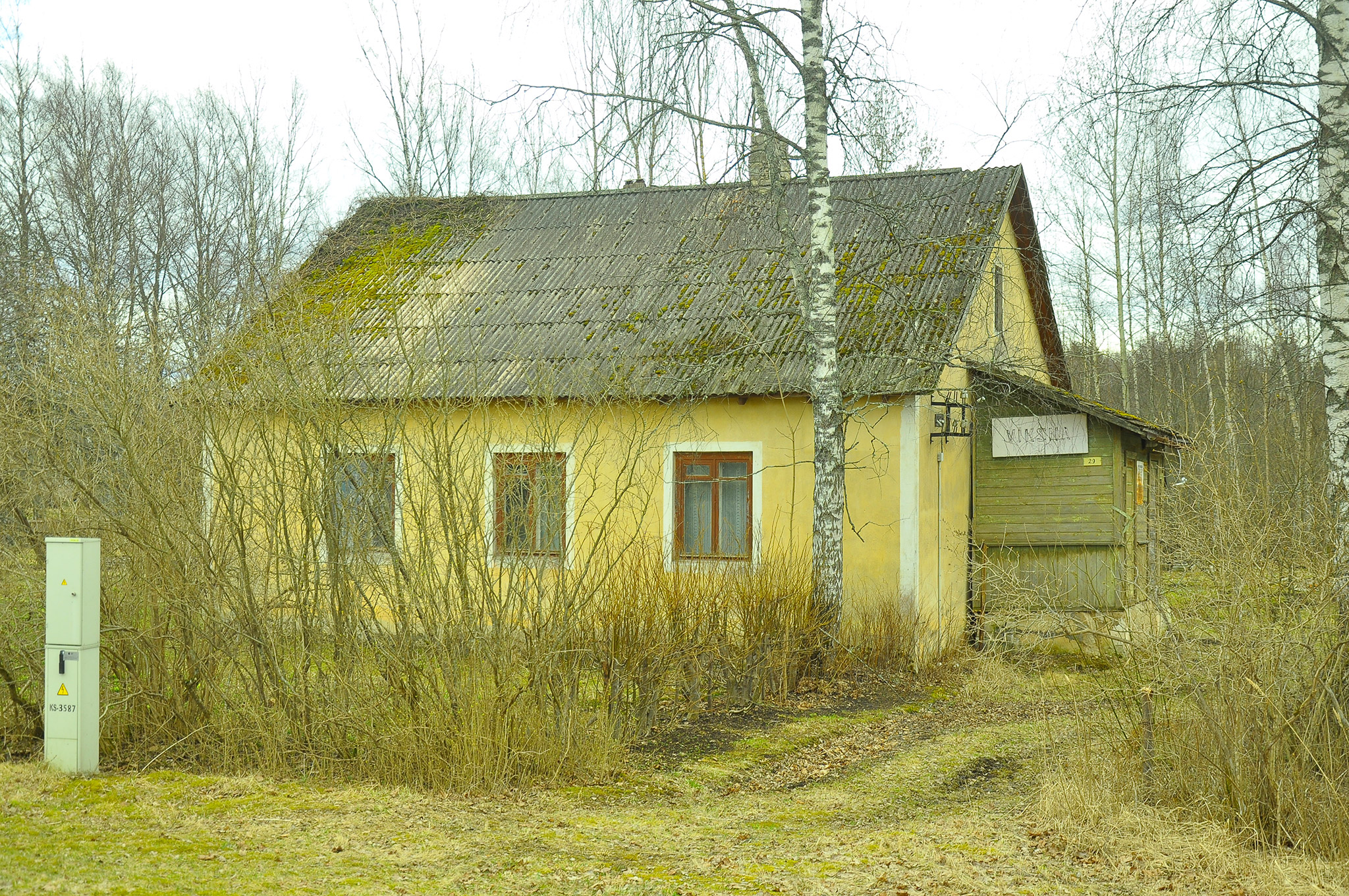 Dzelzceļa stacija "Vīksna" slēgtajā līnijā Ieriķi - Abrene